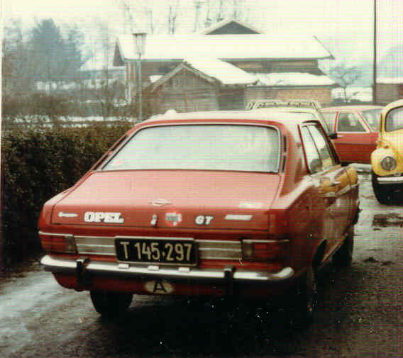 Opel Olympia A